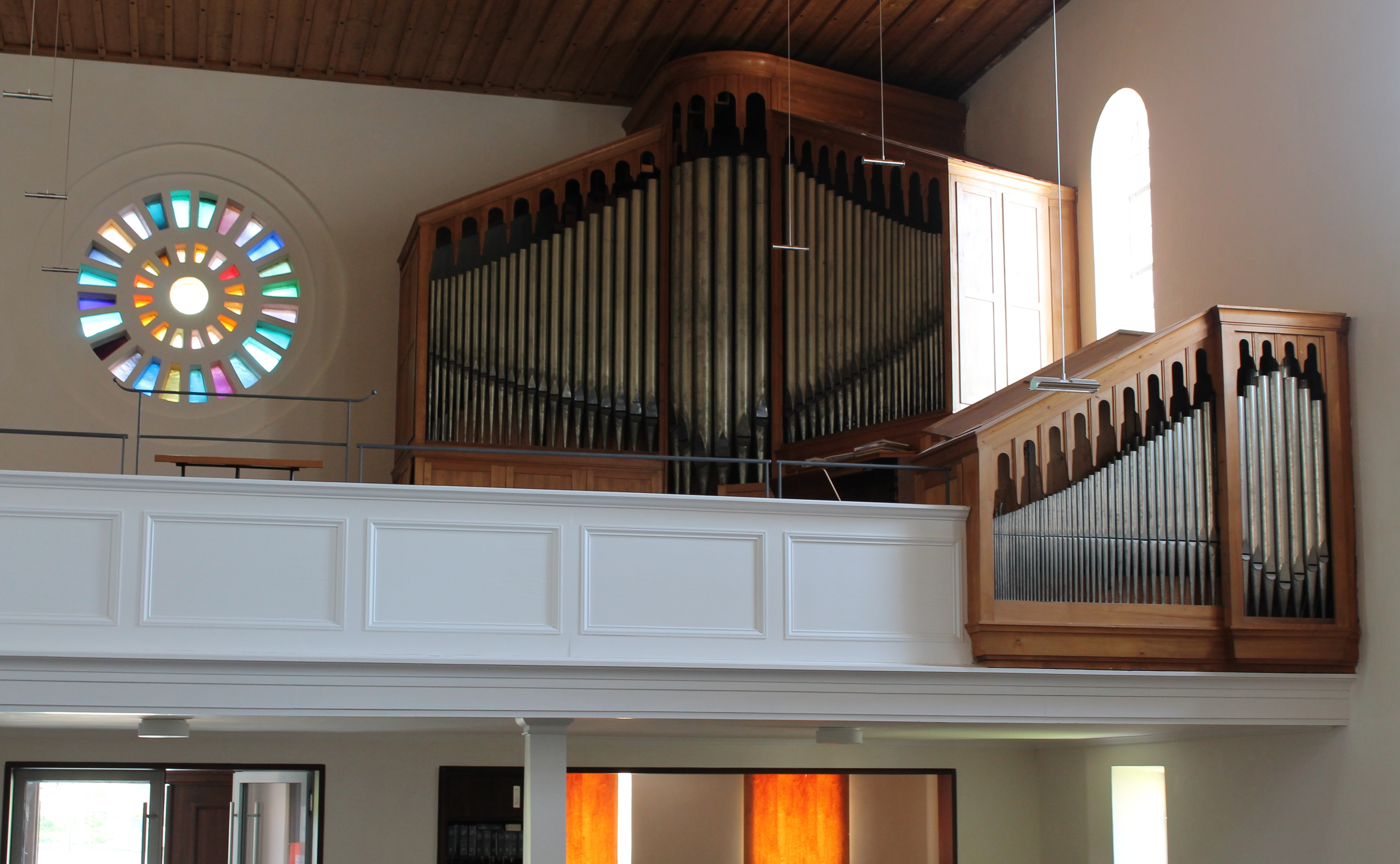 Orgel der Himmelfahrtskirche in Freising (1953, Paul Ott, II/24)